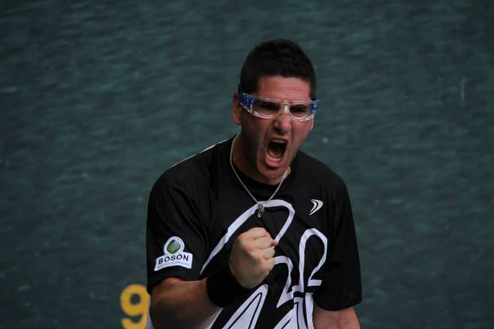 mx frontour